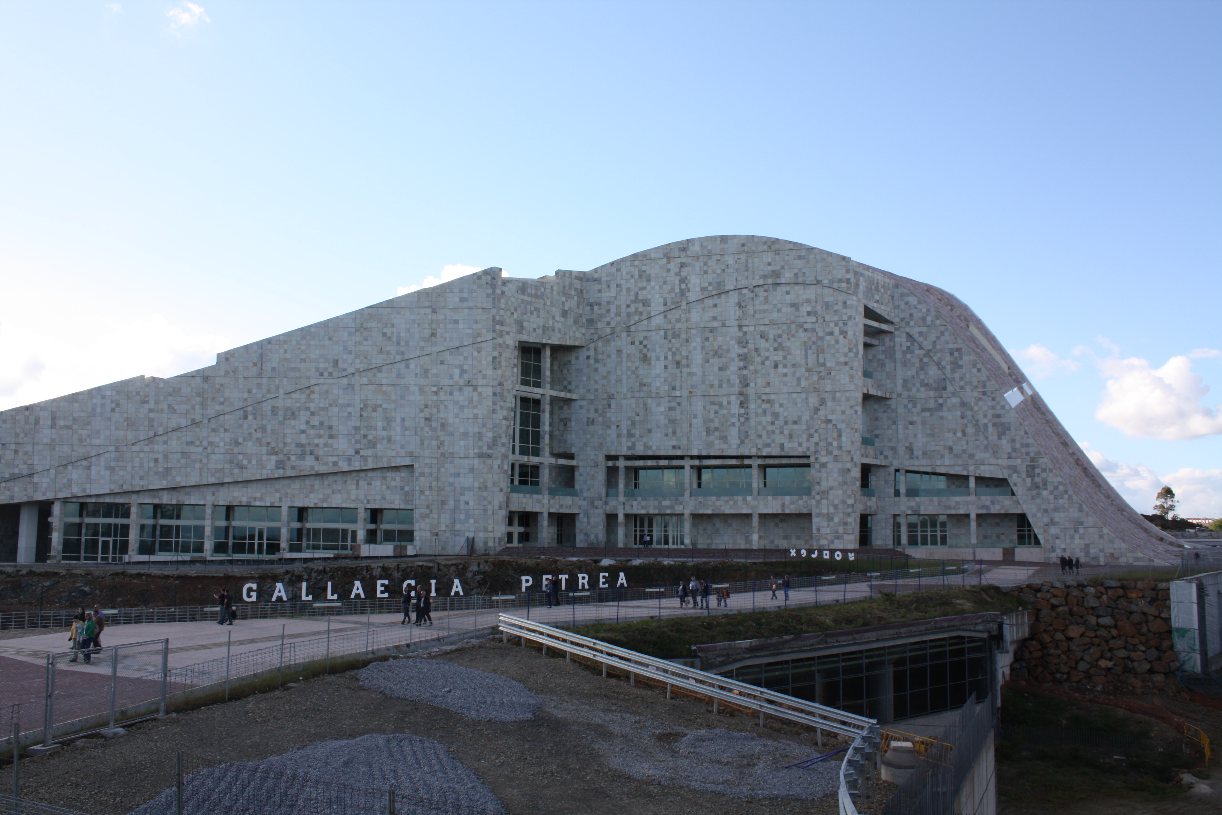 Museo de Galicia, na Cidade da Cultura (Santiago de Sompostela).